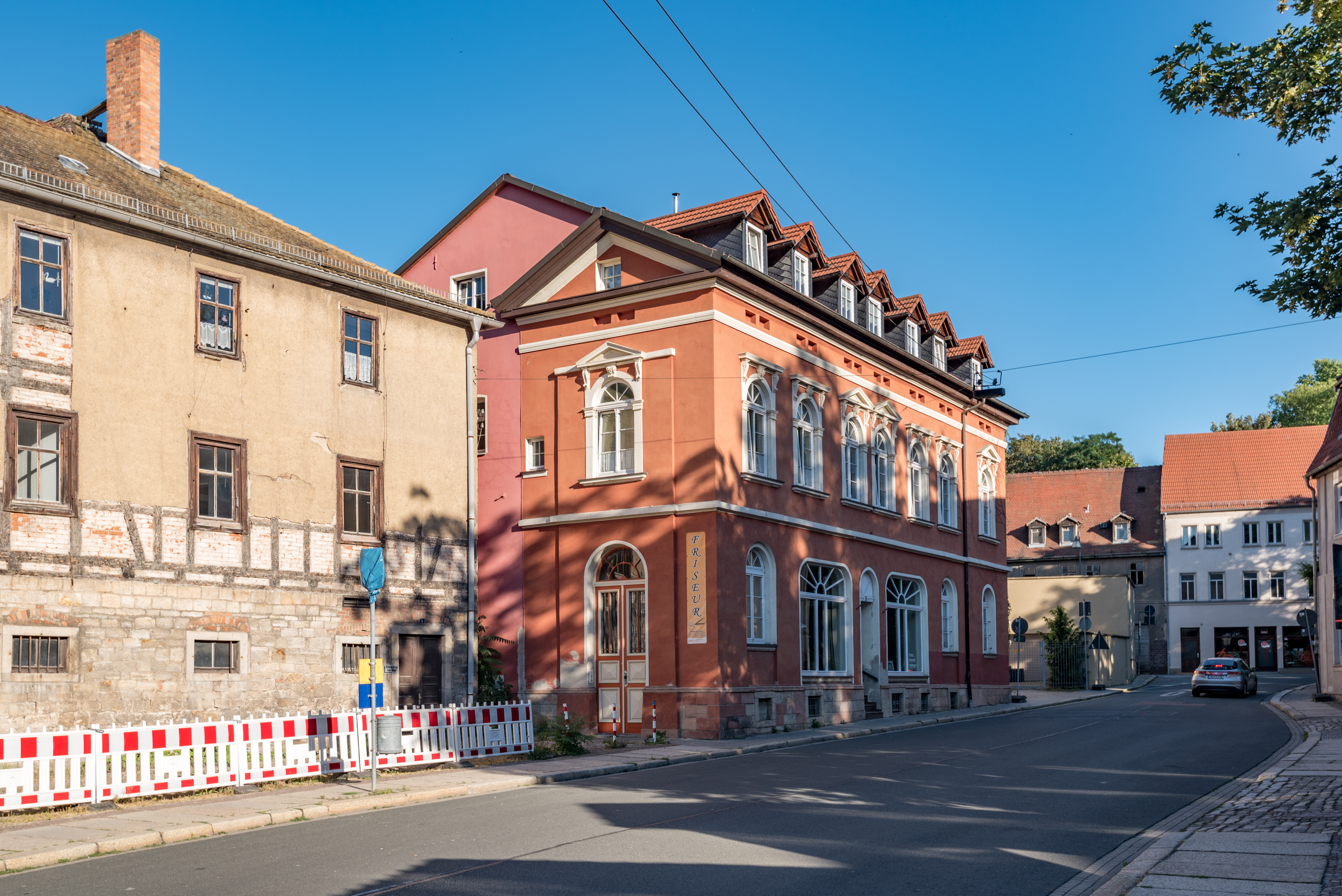 Weißenfels, Saalstraße 3